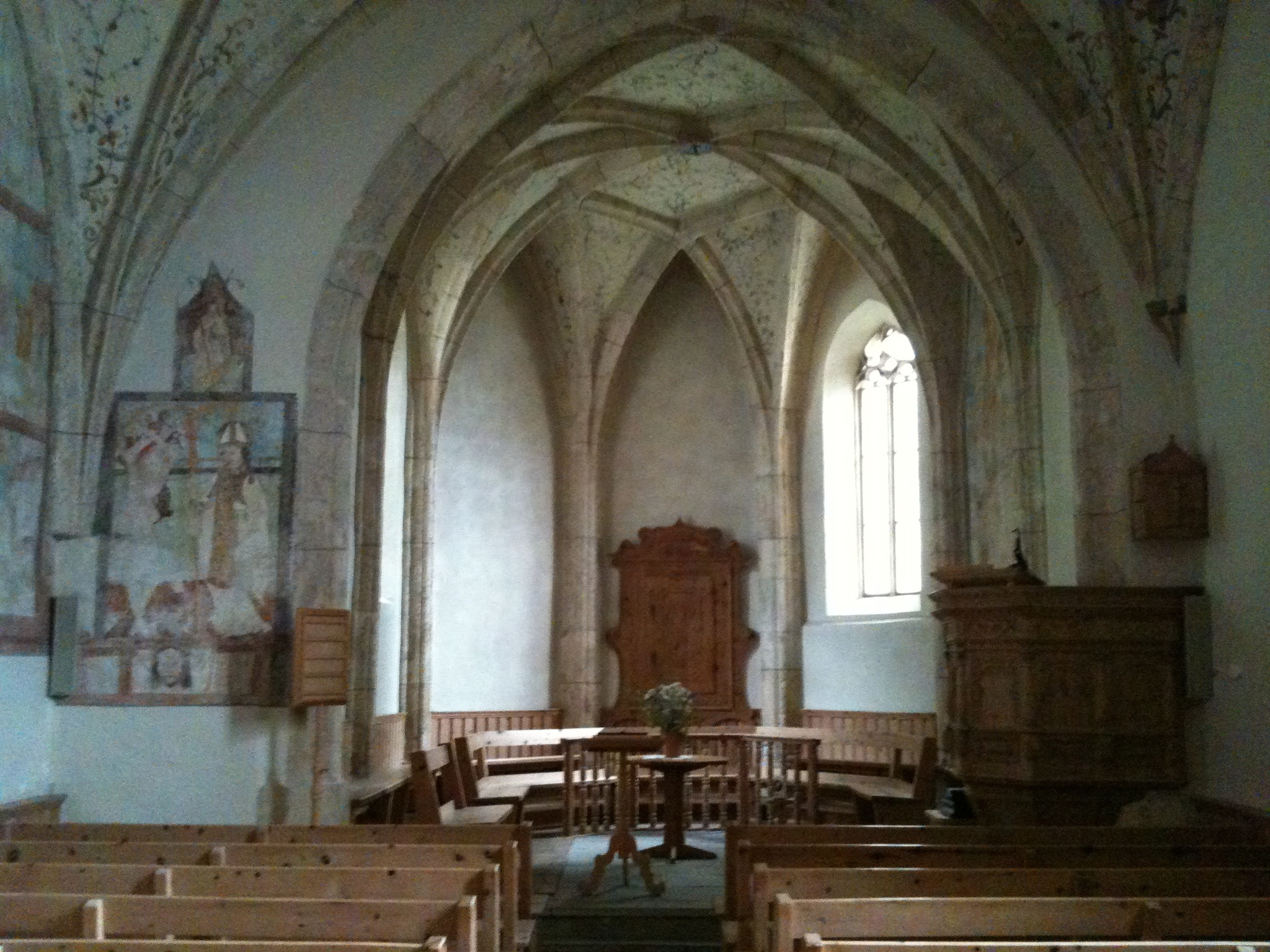 reformierte Kirche San Plansch in Tschlin